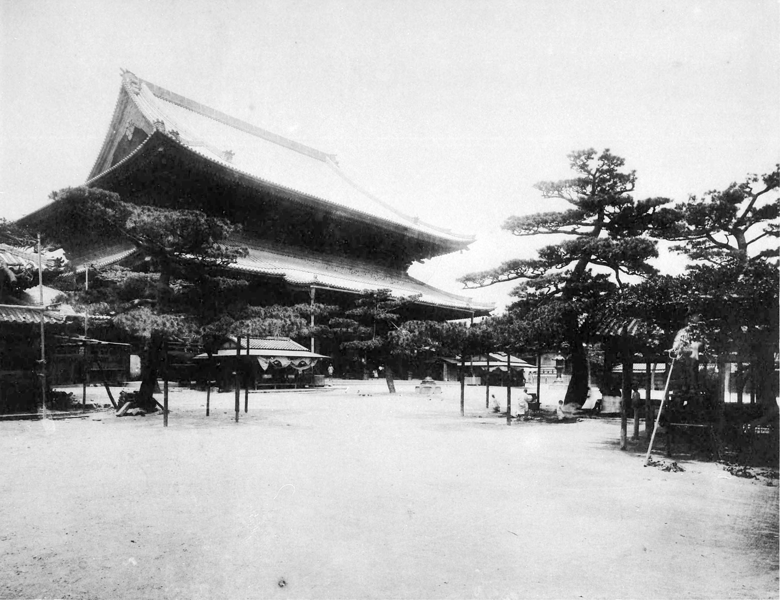 戦前の南御堂